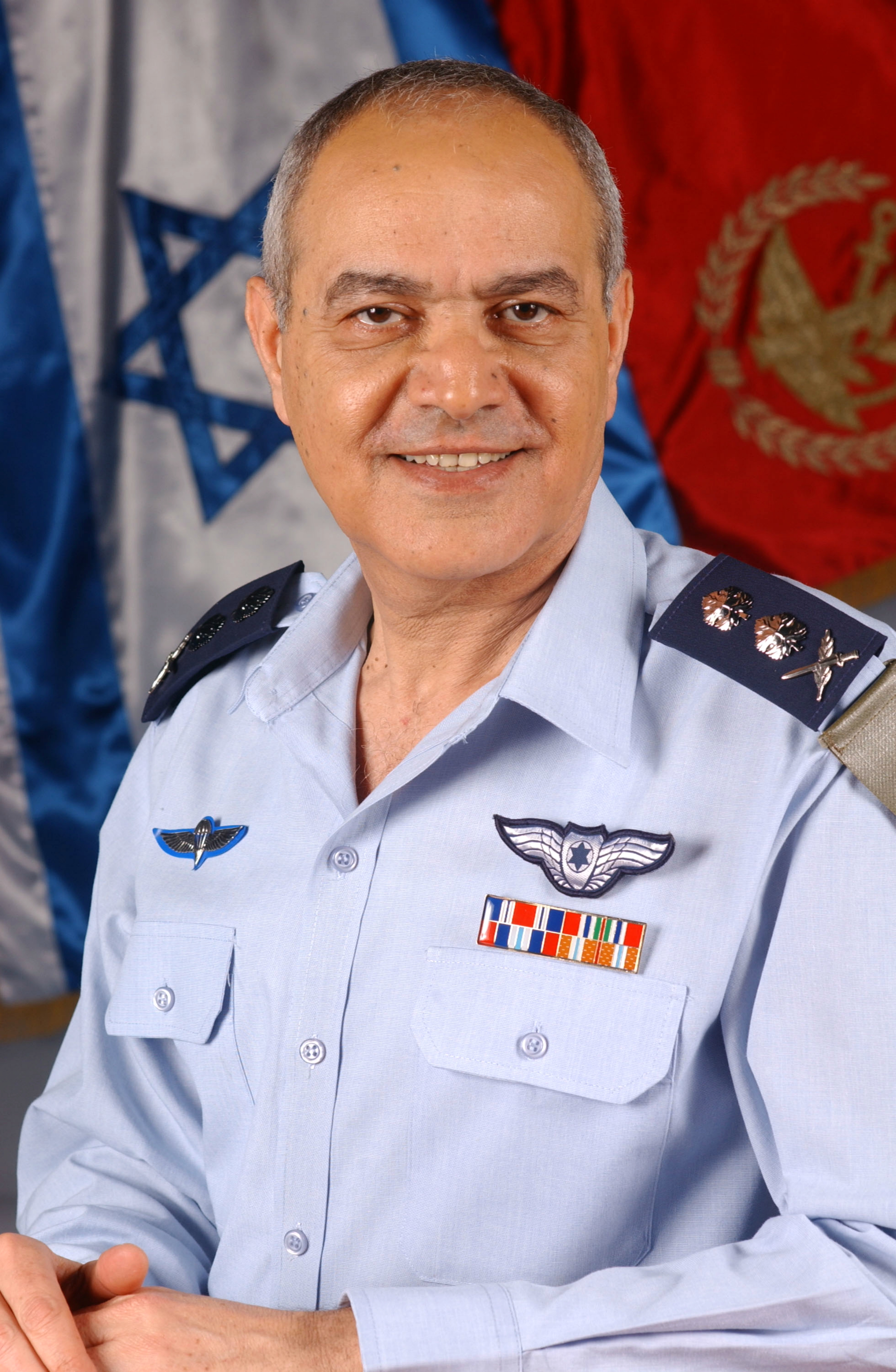 הרמטכ"ל רא"ל דן חלוץ.